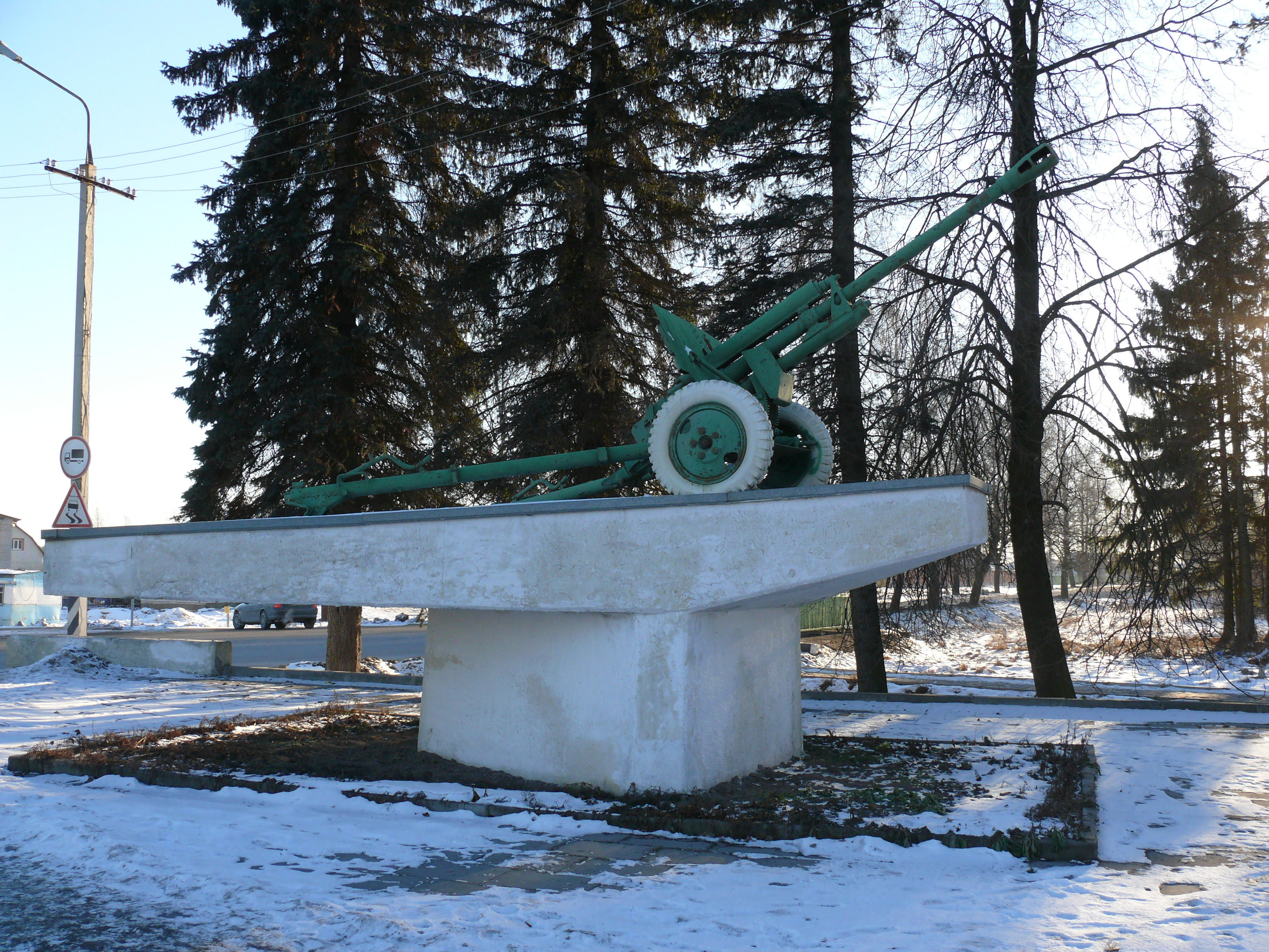 76-мм пушка, установленная в ознаменование подвига советских воинов при обороне и освобождении г. Ярцево от фашистских захватчиков: у автомагистрали Москва-Минск, Ярцево, Ярцевский район, Смоленская область